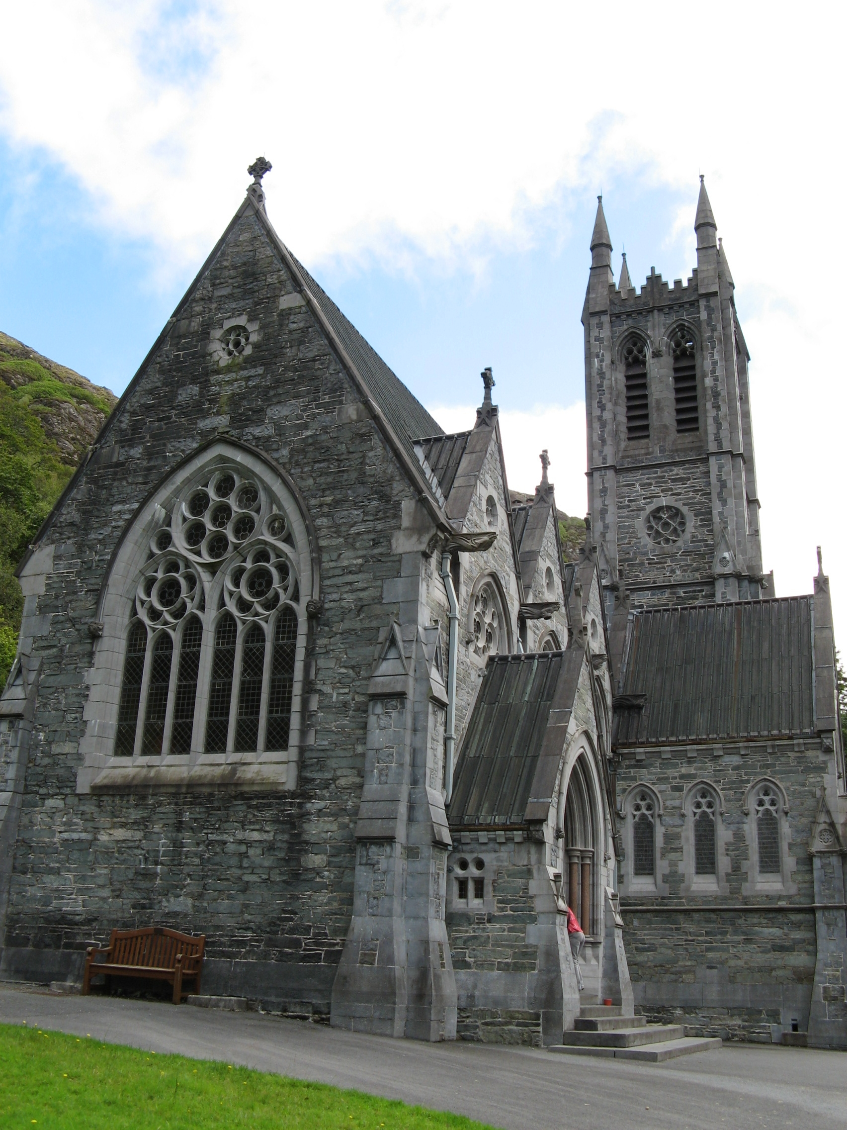 Kerk bij Kylemore Abbey